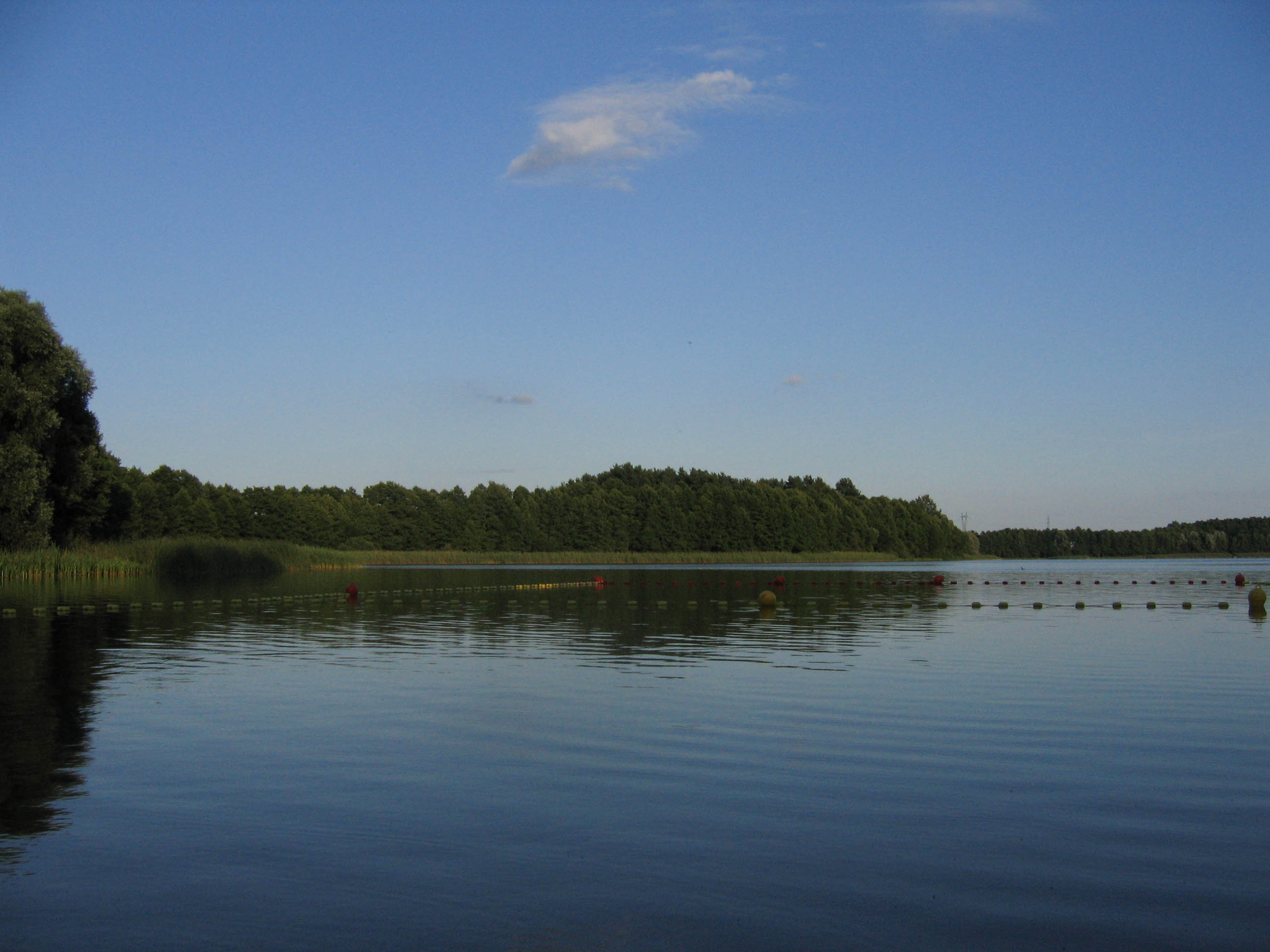 Jezioro Skanda w Olsztynie